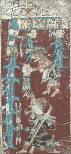 DresdenCodex pagina 71